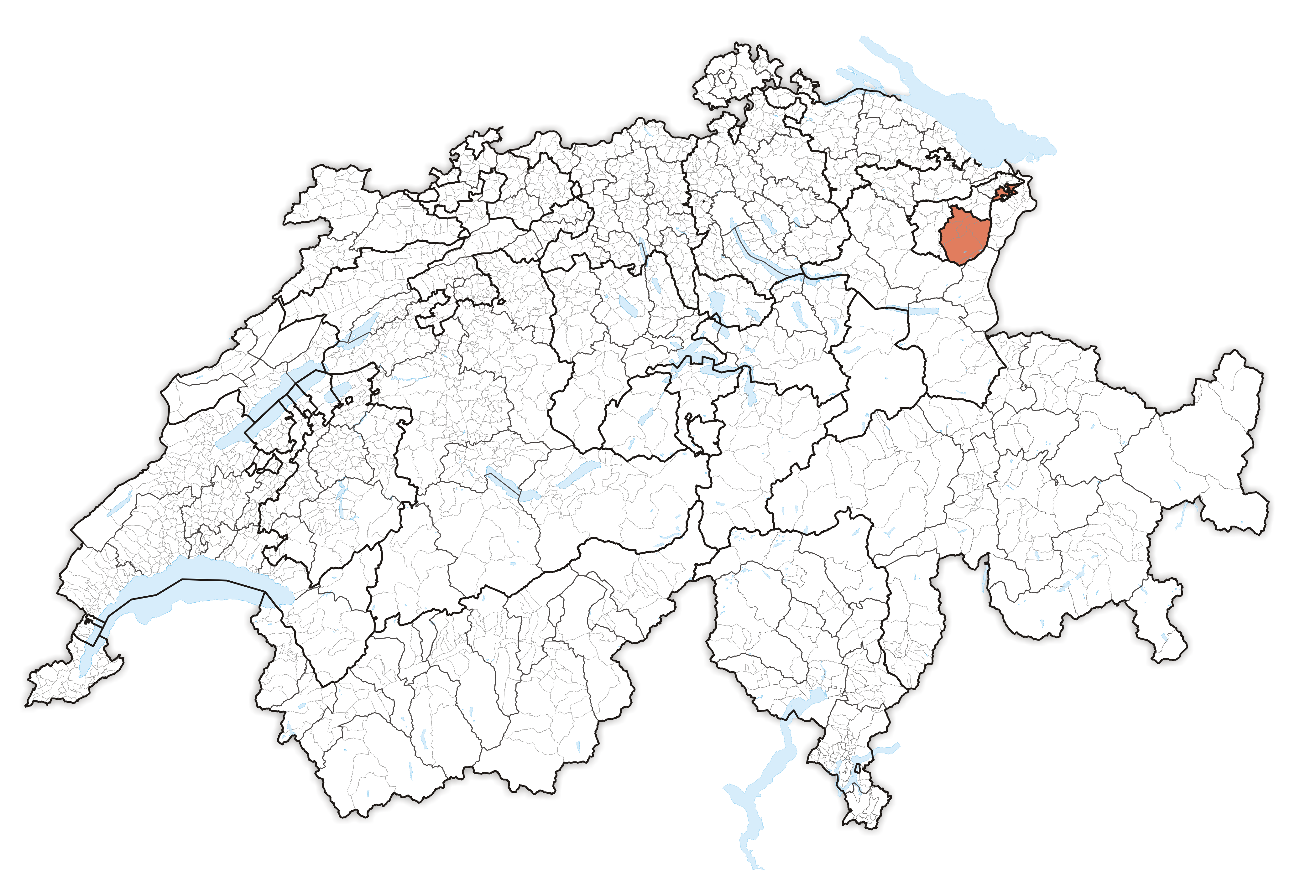 Canton Appenzell Innerrhoden